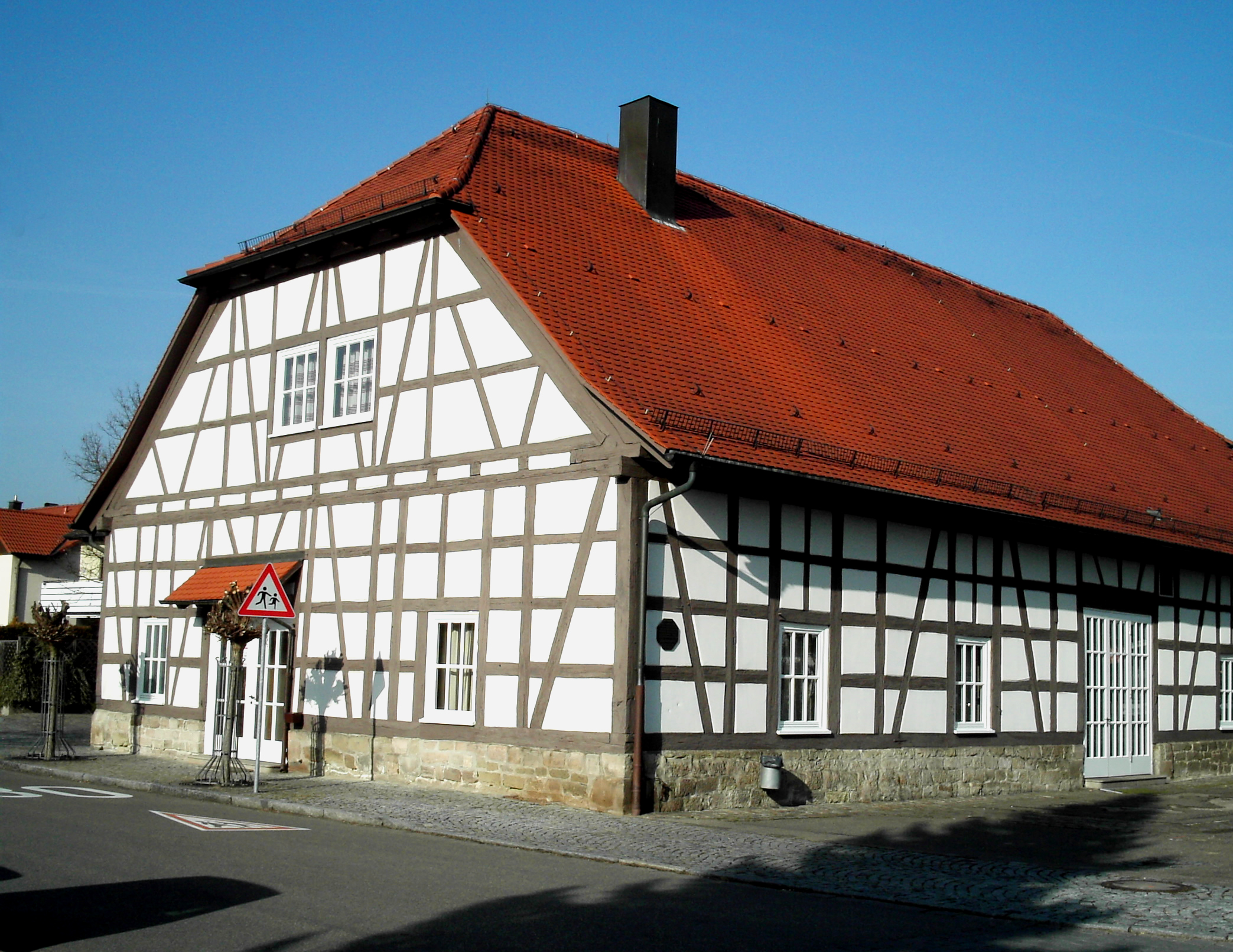 Bürgerhaus Kelter